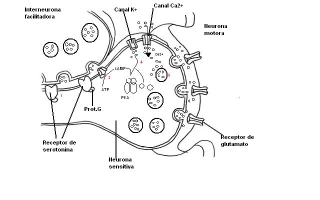 Mecanismo de Refuerzo presináptico Que subyace una la sensibilización conductual.